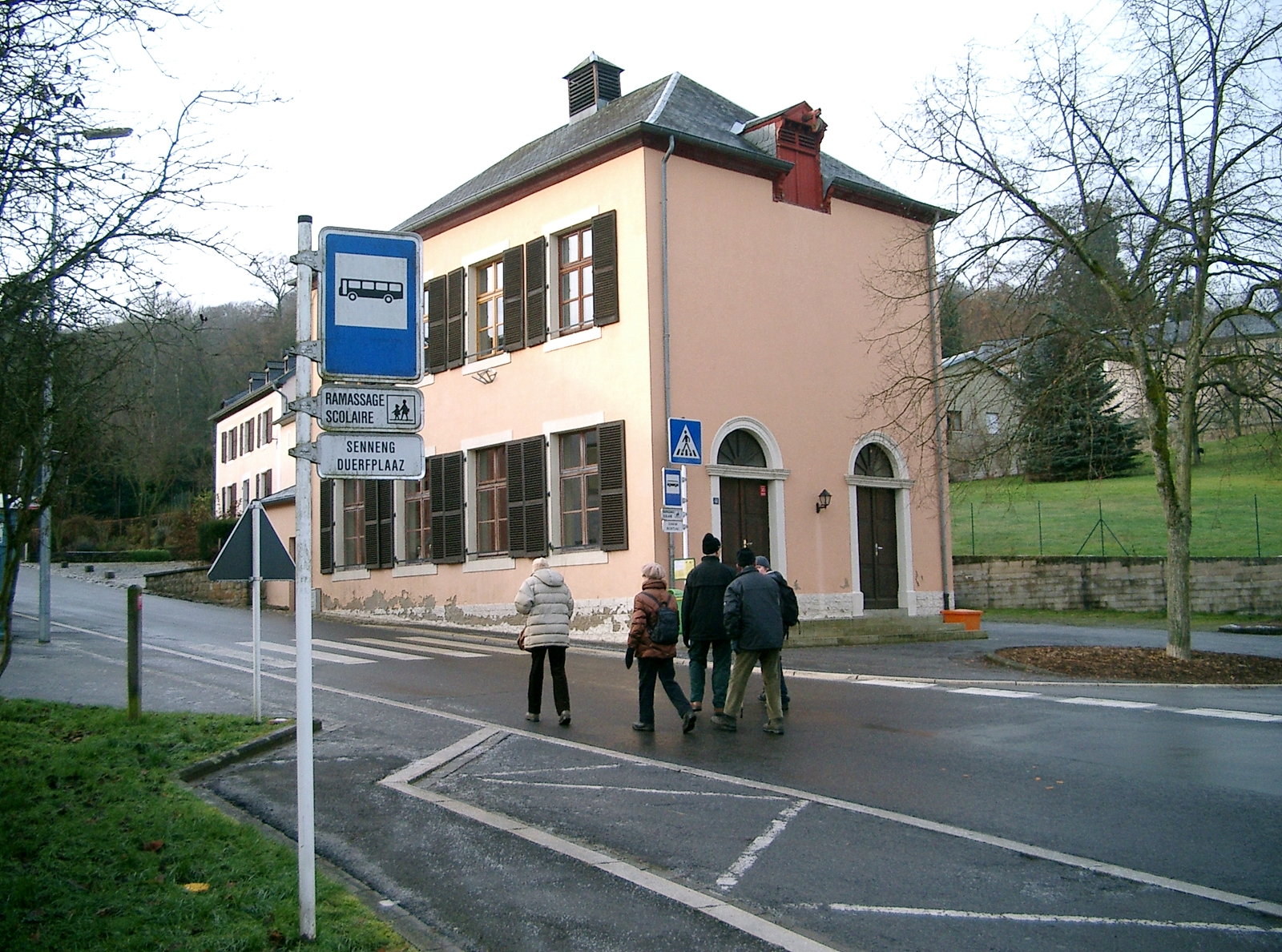 Al Schoul op der Duerfplaz zu Senneng; Source: Eege Foto vum :lb:Benotzer:Pecalux; Datum: 14.12.2008